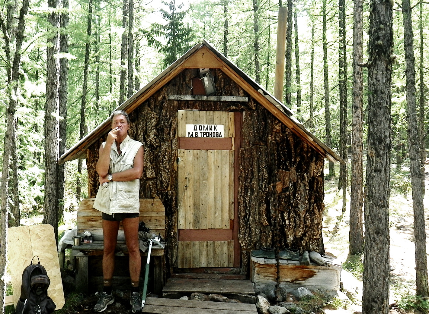 Домик М.В. Тронова, в котором он жил в свои последние экспедиционные годы.